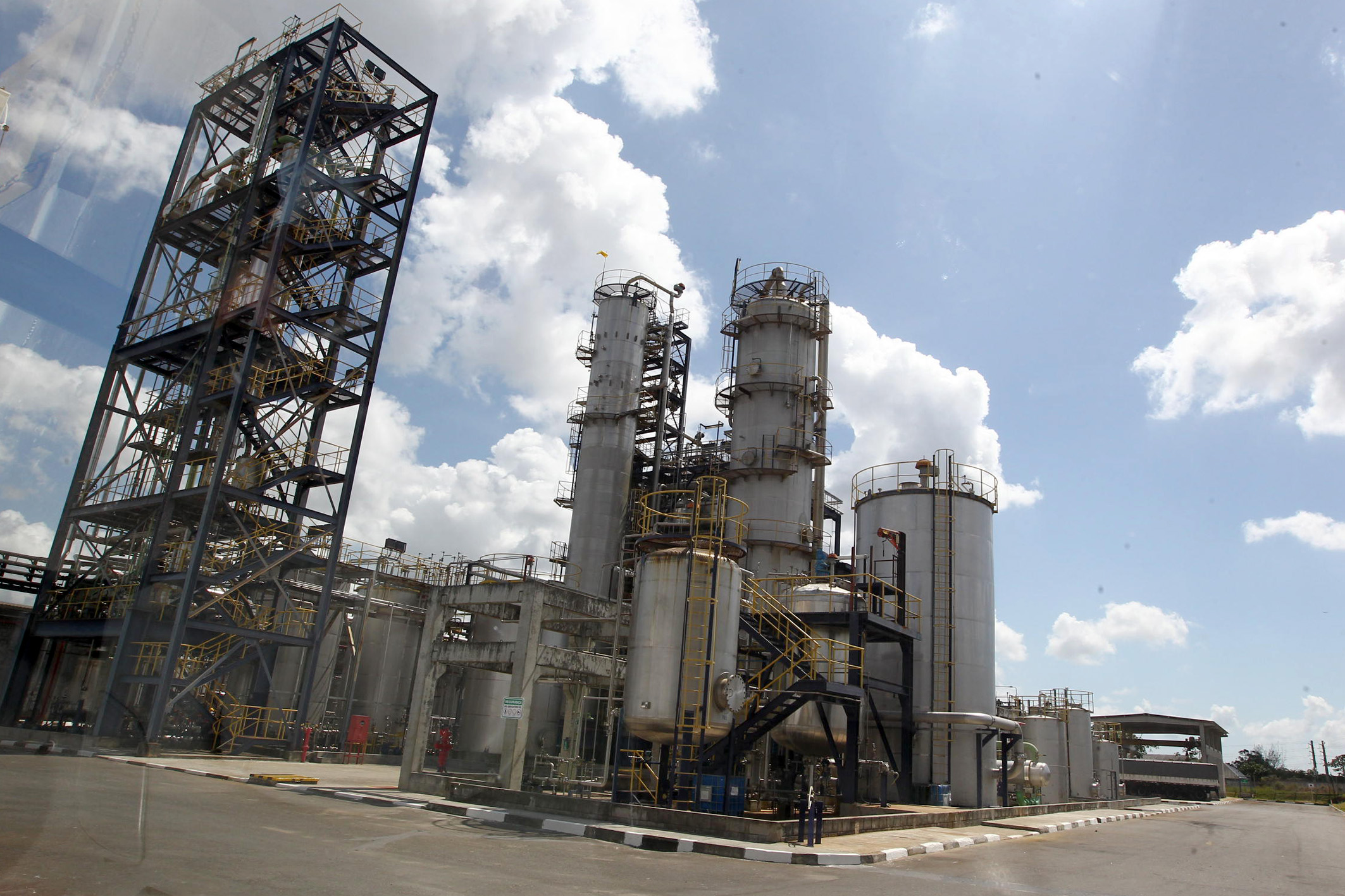 Governador Jaques Wagner participa da inauguração da Unidade de Hidrogênio da Peroxy Bahia, no Polo Petroquímico de Camaçari. Foto Manu Dias/ SECOM